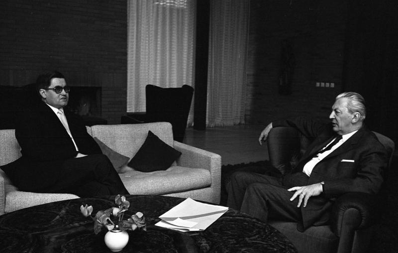 Bundeskanzler Kiesinger empfängt den Bürgermeister von Bremen, Koschnick